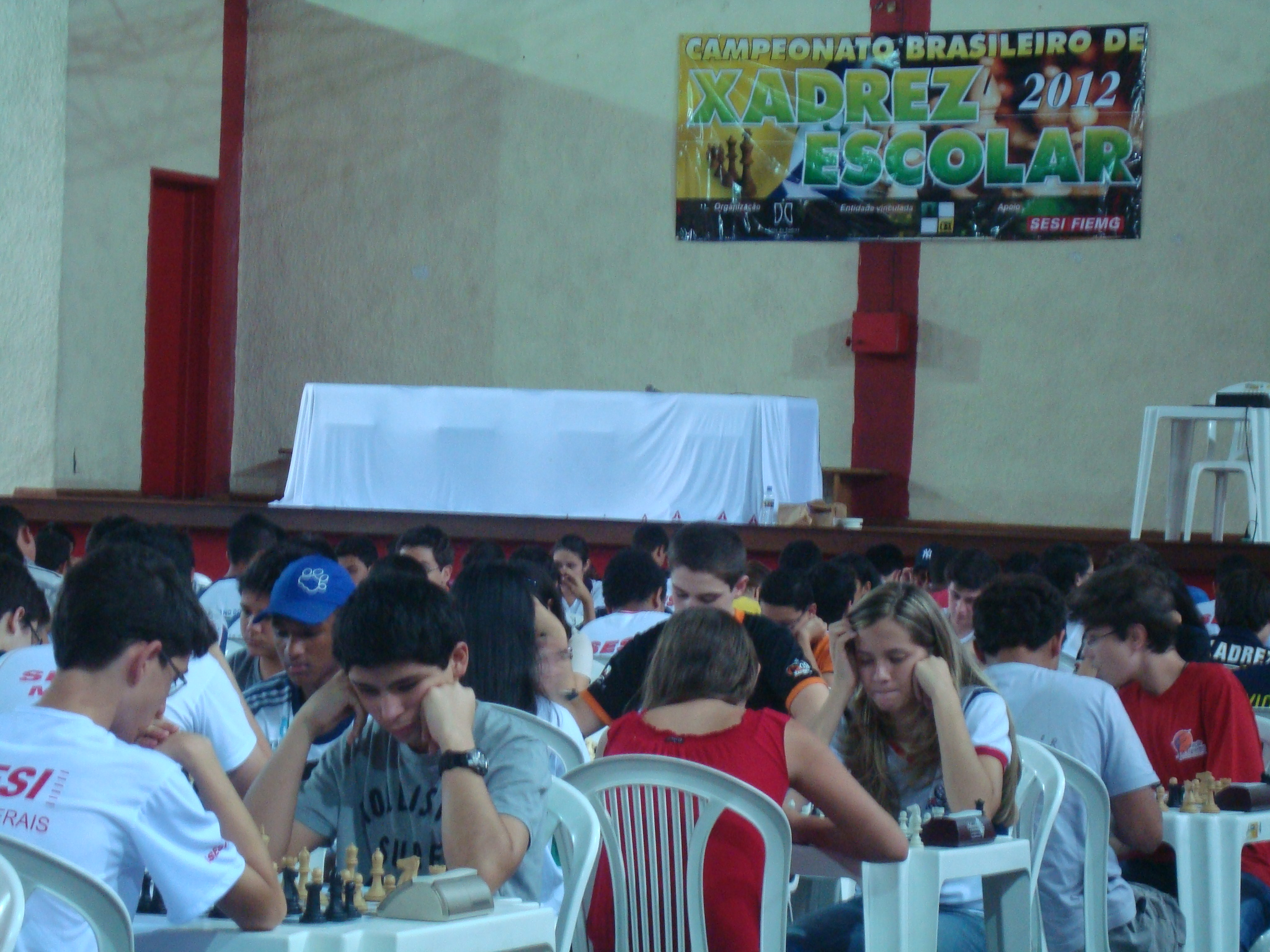 Crianças disputam partidas de xadrez no Campeonato Brasileiro de Xadrez Escolar, em Juiz de Fora - MG, Brasil.